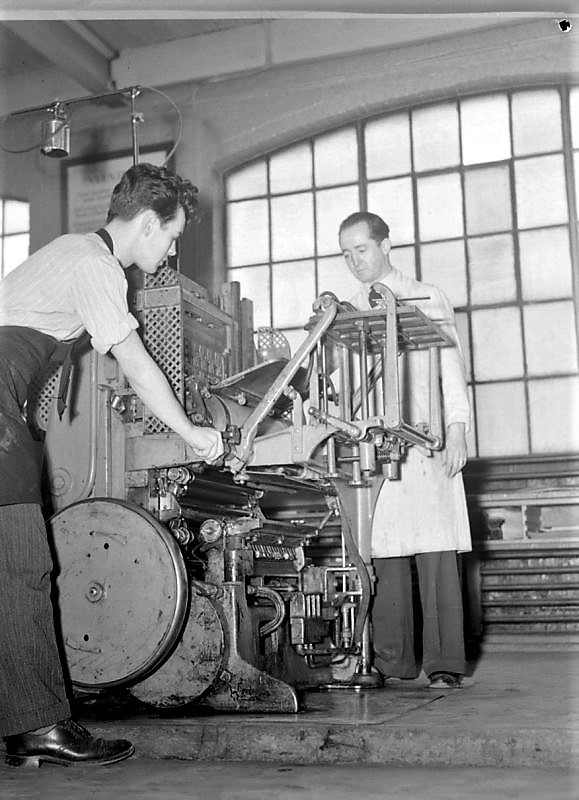 École des arts graphiques. Ministère de la Jeunesse Présentation des activités de l'École des arts graphiques située sur la rue Kimberley à Montréal. Parmi les étudiants et les professeurs, nous voyons des apprentis linotypistes .